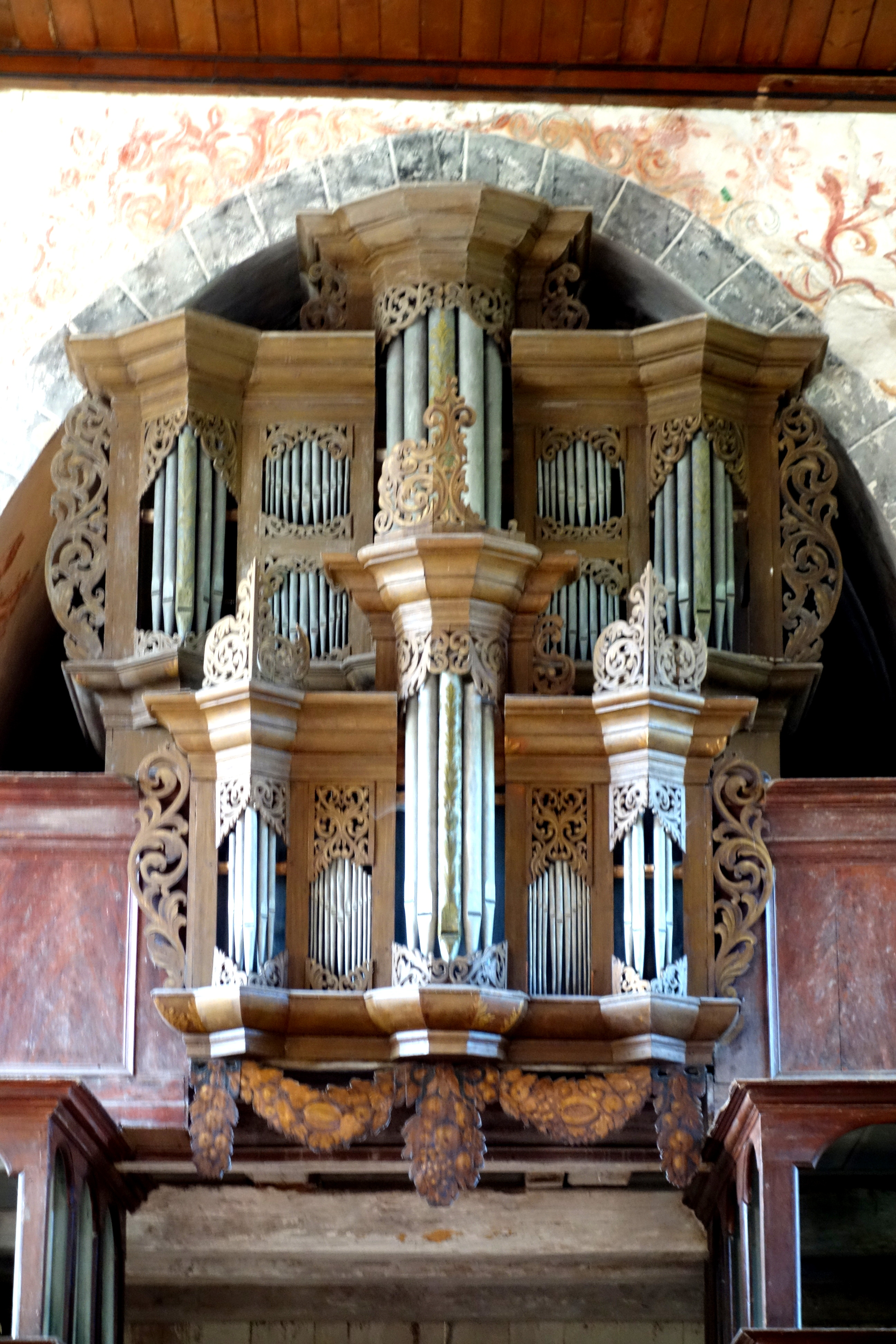 Kirche Mühlen Eichsen, Landkreis Nordwestmecklenburg, Mecklenburg-Vorpommern, Deutschland